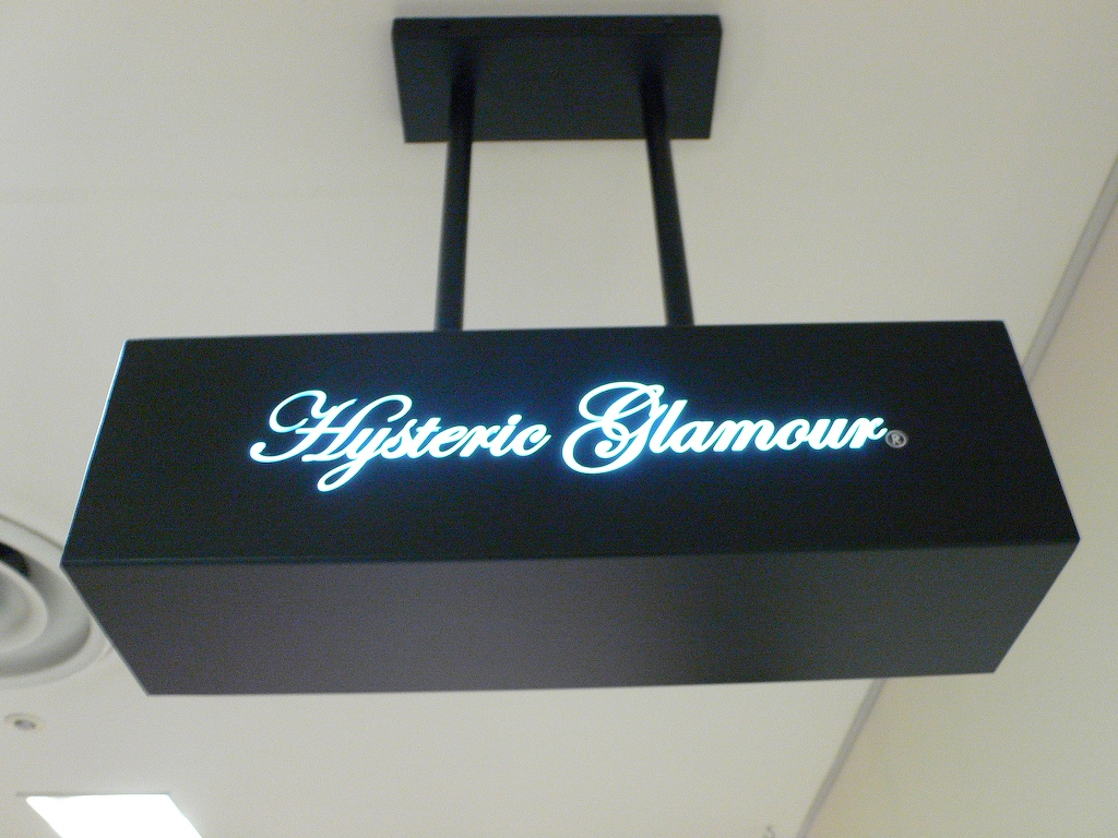 「ヒステリックグラマー」ショップの看板